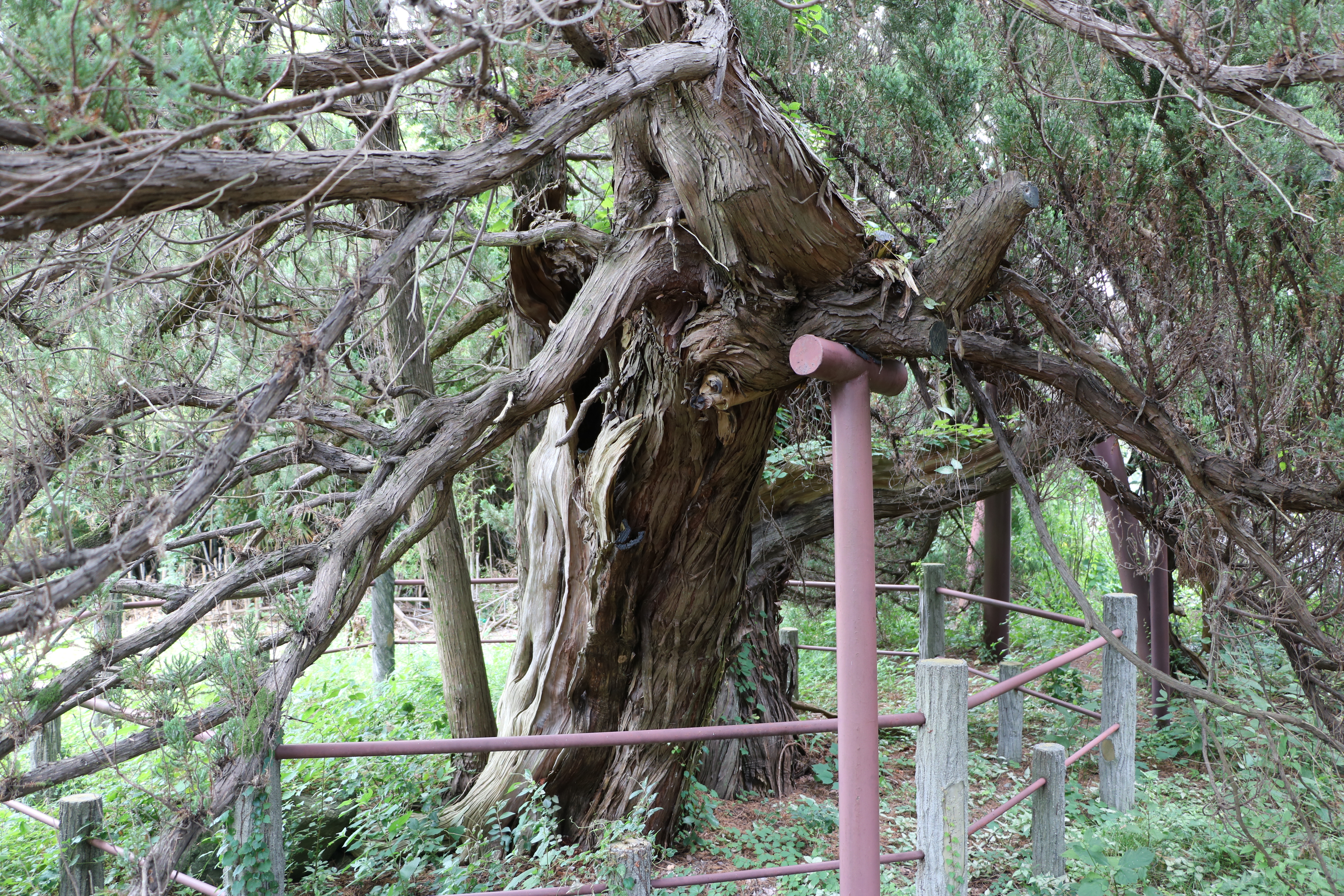 古長禅寺のビャクシンの北東の木（国指定天然記念物、山梨県南アルプス市）